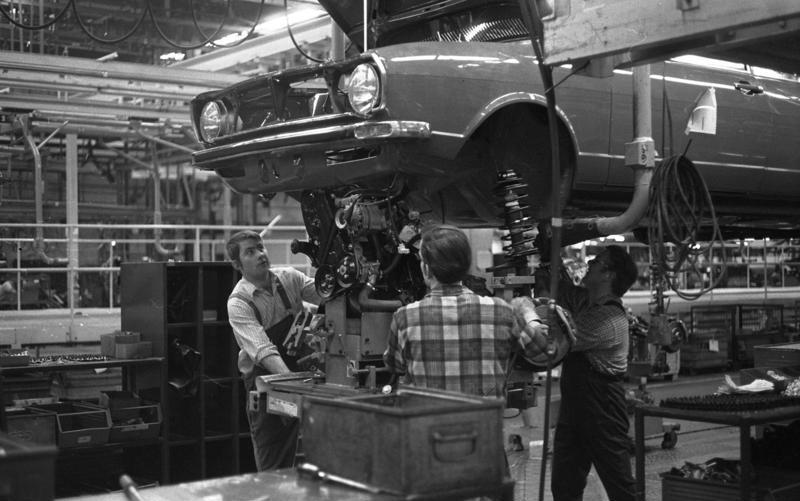 VW-Werk, Wolfsburg Audi 80 Montage des Triebsatzes